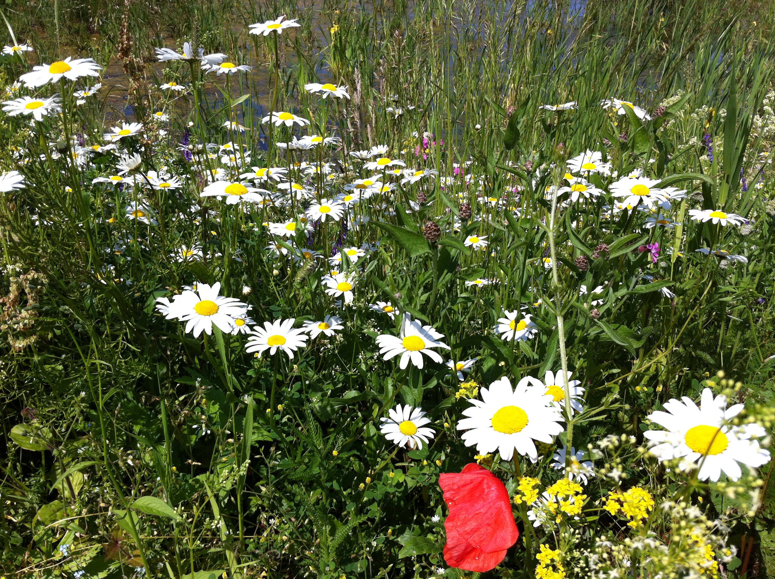 Naturschutzgebiet Haspelmoor (NSG-00250.01), Oberbayern. Das Haspelmoor wird in der Mitte durch eine vierspurige Bahntrasse durchzogen. An den Seiten der Gleise wachsen Wildblumen, die ihm Juni in allen Farben blühen.